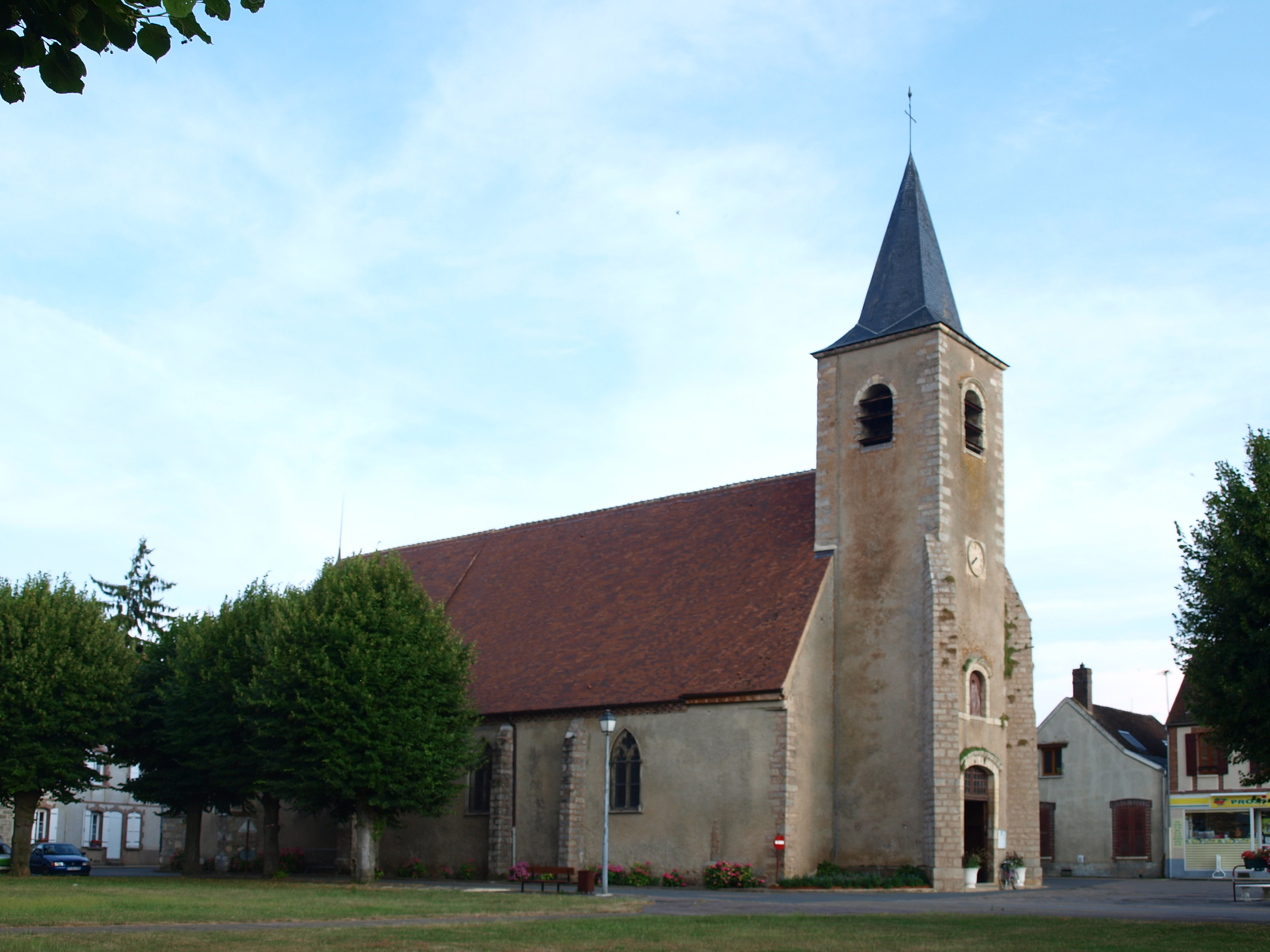 Véron (Yonne, France) ; église Saint-Gorgon-et-Saint-Dorothée.